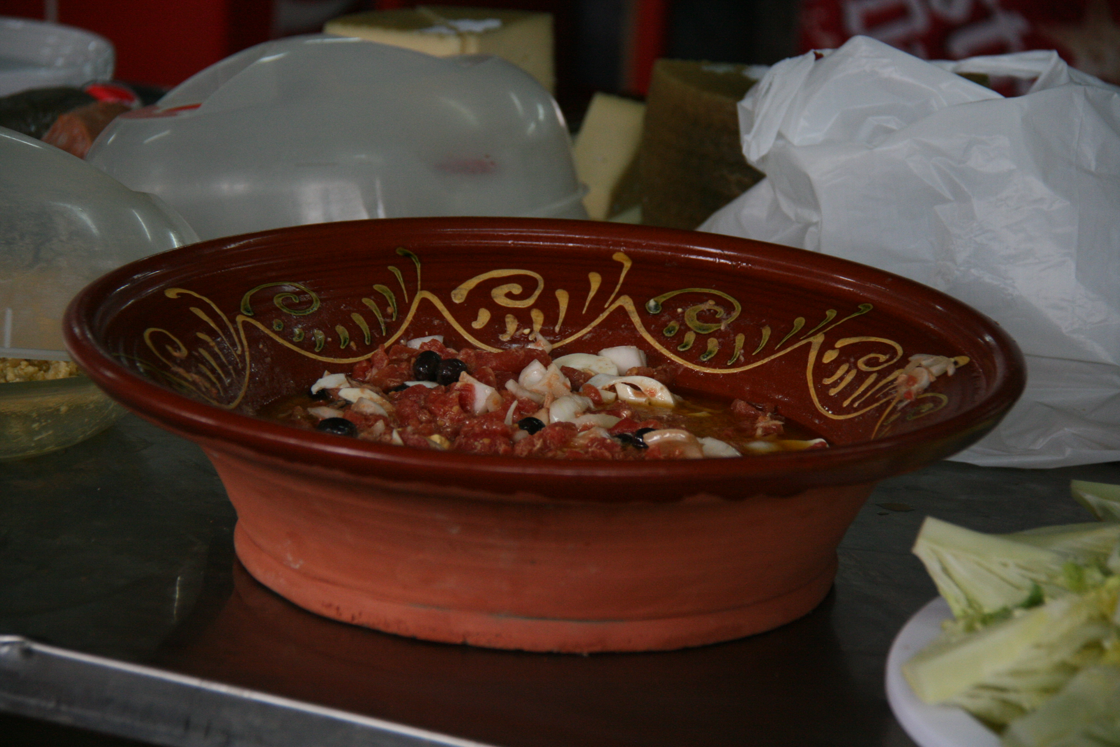 Ensalada Murciana - Recipiente tradicional (Lebrillo)